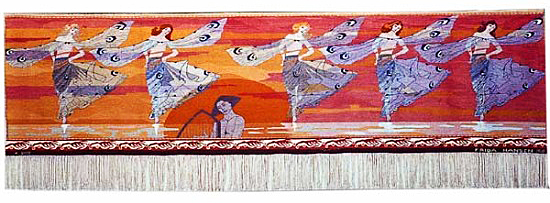 Libellenes dans 1901